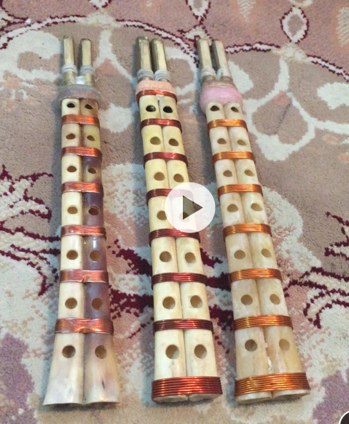 قشمه ها در سایز های مختلف . از جنس استخوان و همراه با سر ساز های برنجی